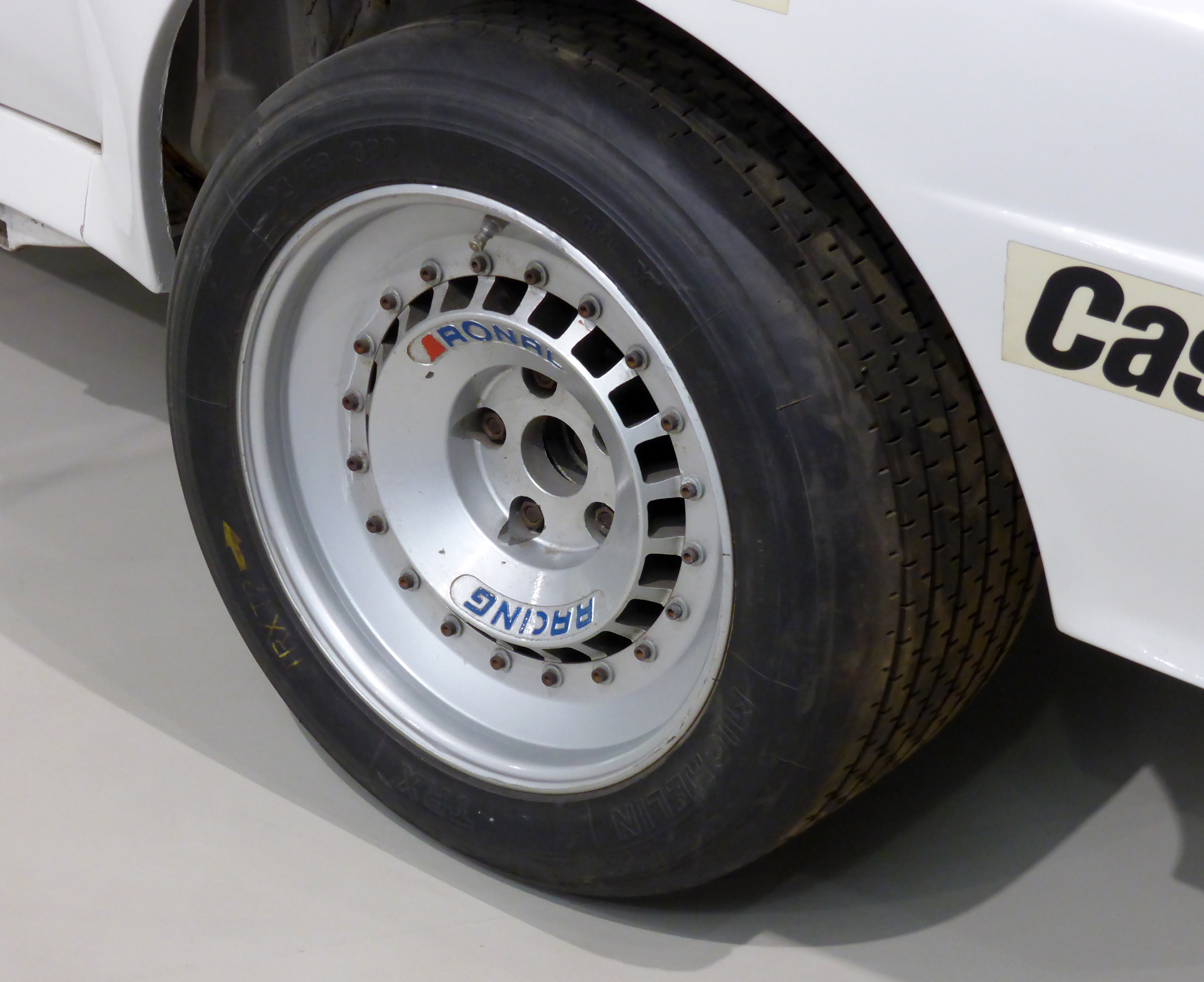 Michèle Mouton, Audi quattro (Rallye-Ausführung, Baujahr 1983) im Deutschen Technikmuseum in Berlin. Wikipedianische KulTour am 10. Oktober 2015 in der Ausstellung des Museums.